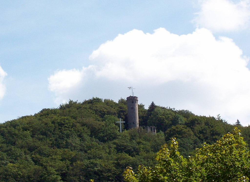 Bilsteinturm in Marsberg (Germany)